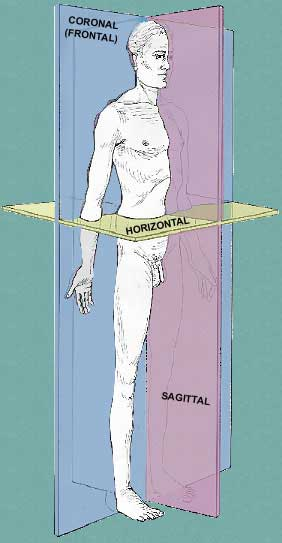 Anatomische vlakken van de mens.